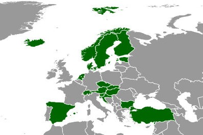 Rozšíření společnosti Bauhaus v roce 2018 v Evropě.